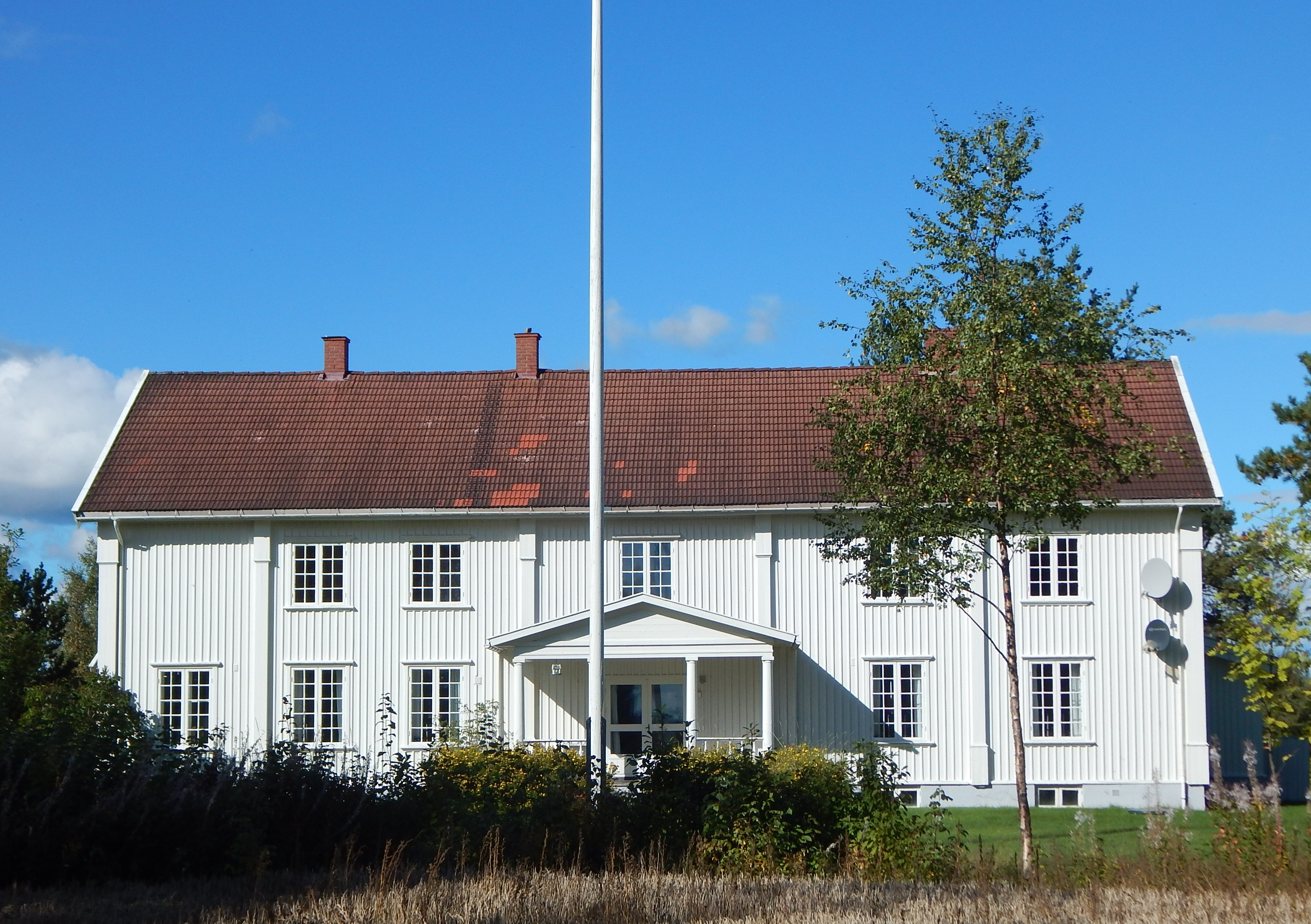 Hovedbygningen ved Grue prestegård. Fredet.